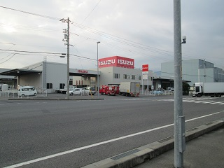 いすゞ中国四国・本社外観